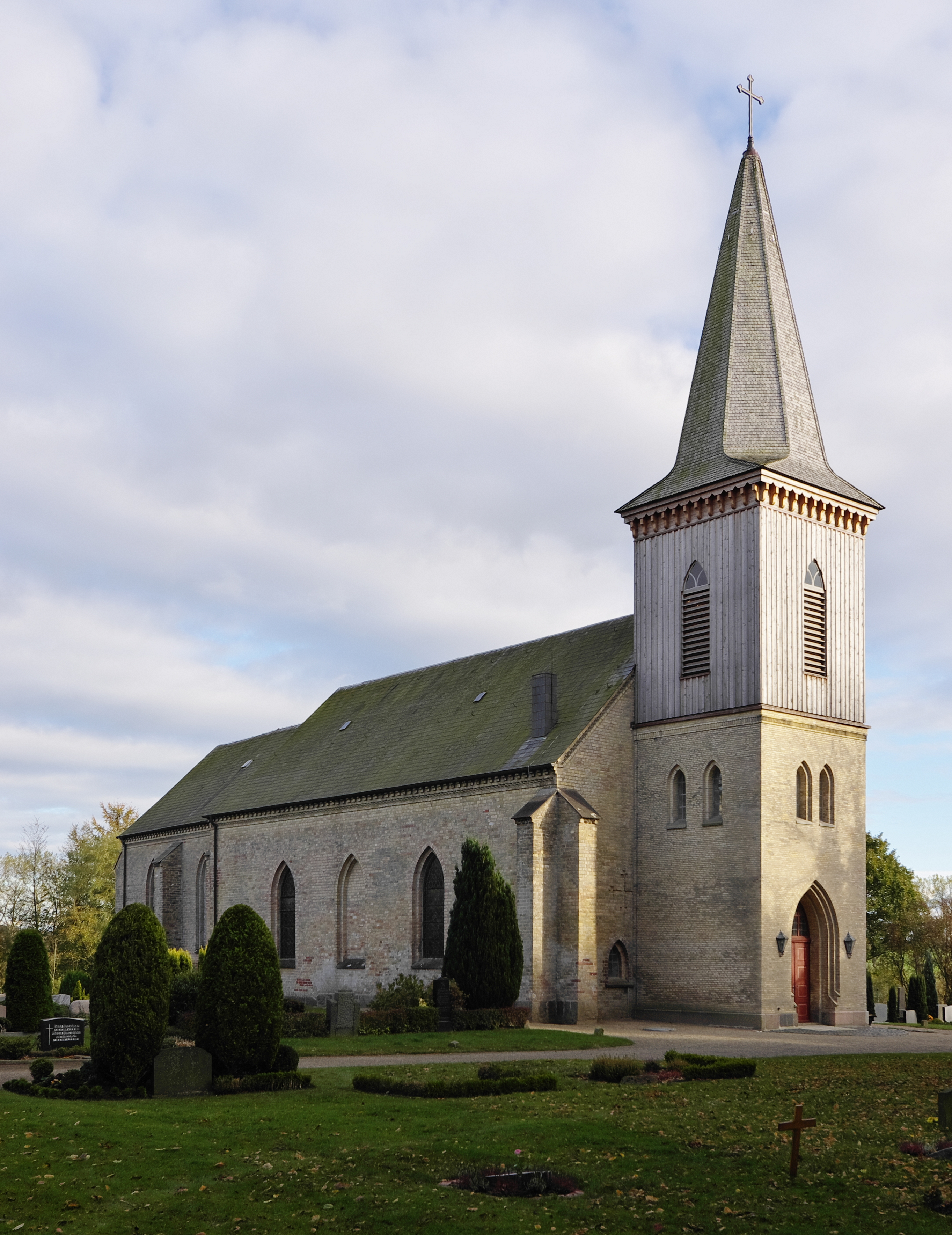 Denkmalgeschützte St. Marien-Kirche in Kahleby, Kreis Schleswig-Flensburg.